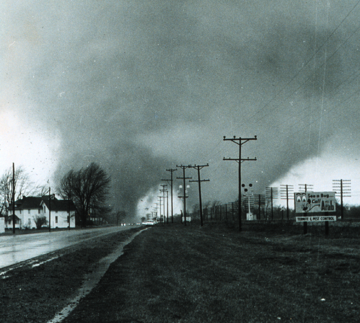 1965 Elkhart, Indiana double tornado on Palm Sunday